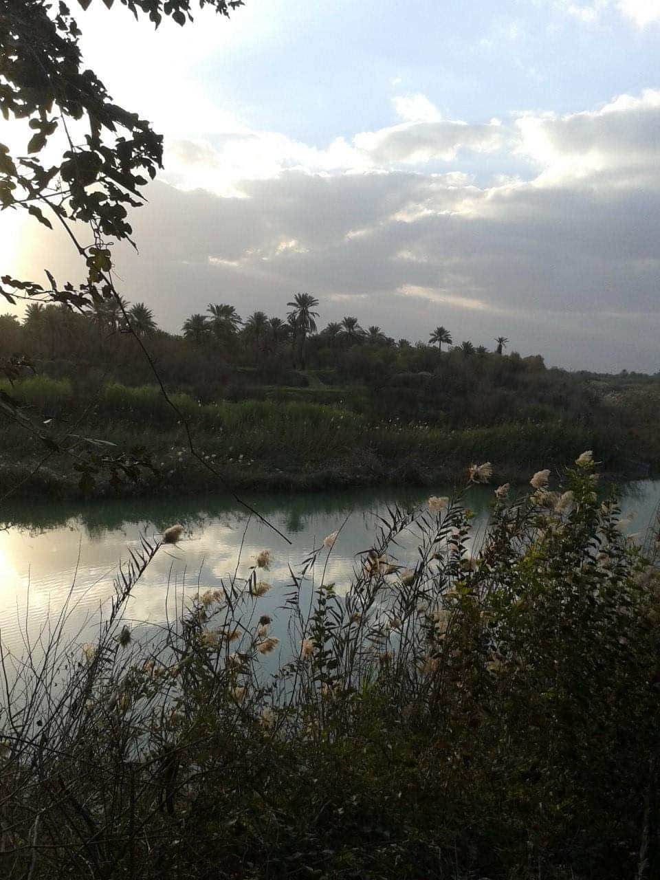 نهر ديالى يعتبر من اعذب الانهار في العالم